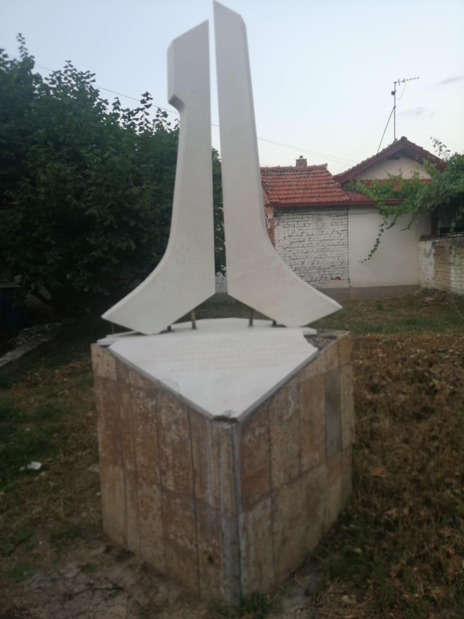 Споменик од НОБ на местото на загинување на Кире Гаврилоски и Круме Волнароски во Прилеп